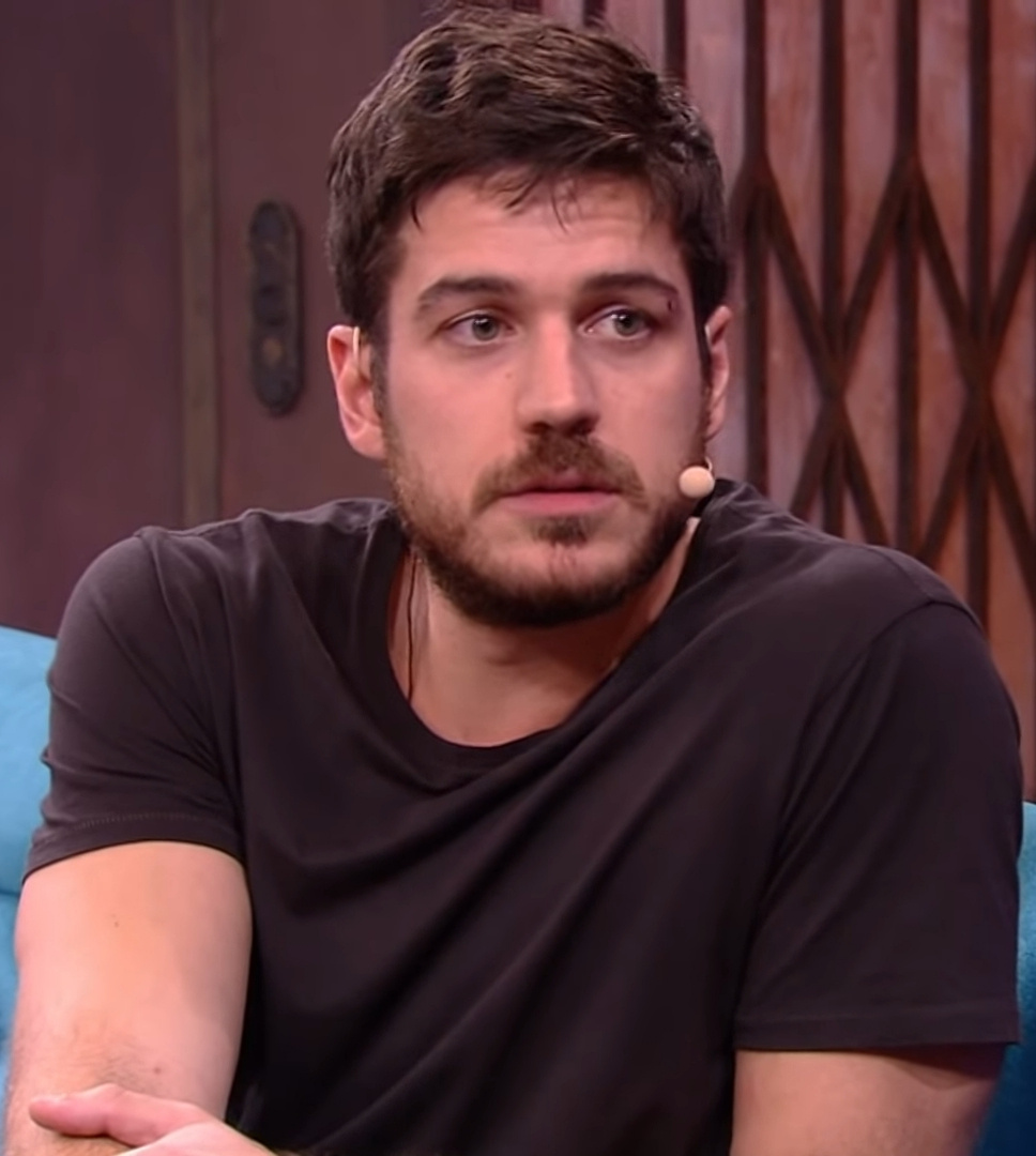 Marco Pigossi conta segredo sobre cenas de nudez e Tatá fica chocada! | Lady Night | Humor Multishow